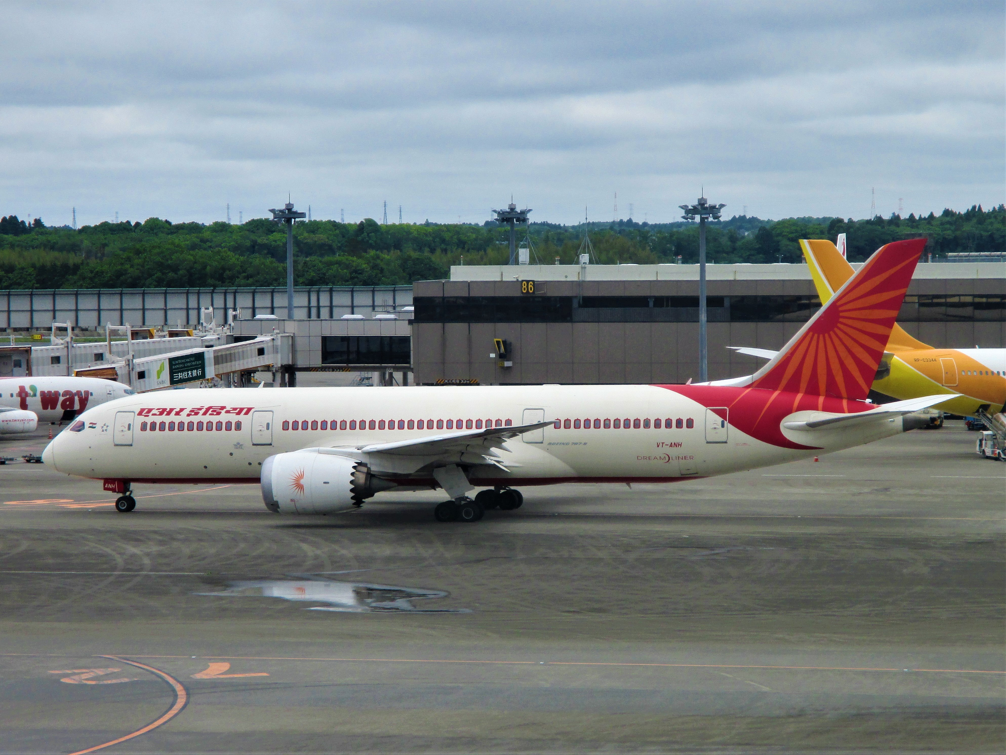 エア・インディアのボーイング787-8（成田国際空港にて）